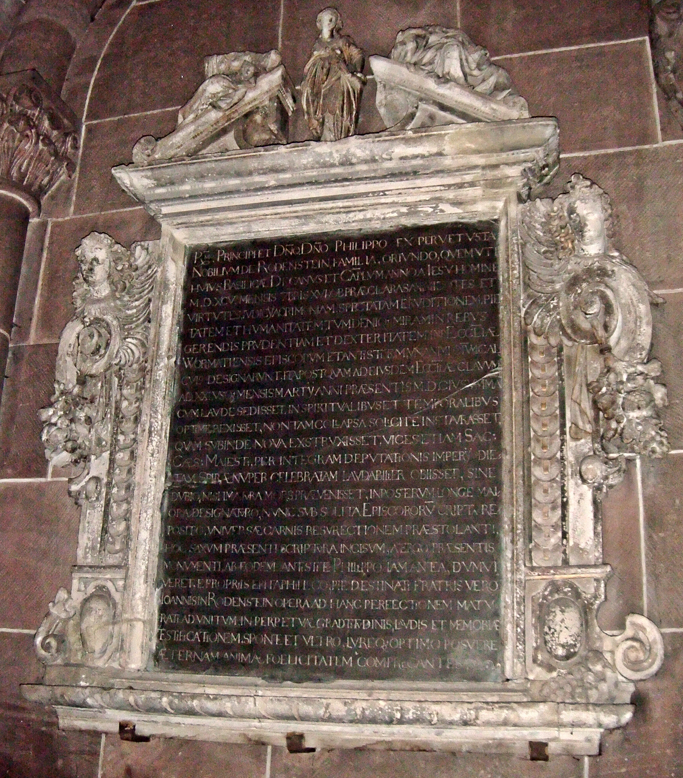 Epitaph des Bischofs Philipp von Rodenstein (1564-1604), Dom zu Worms, Westchor